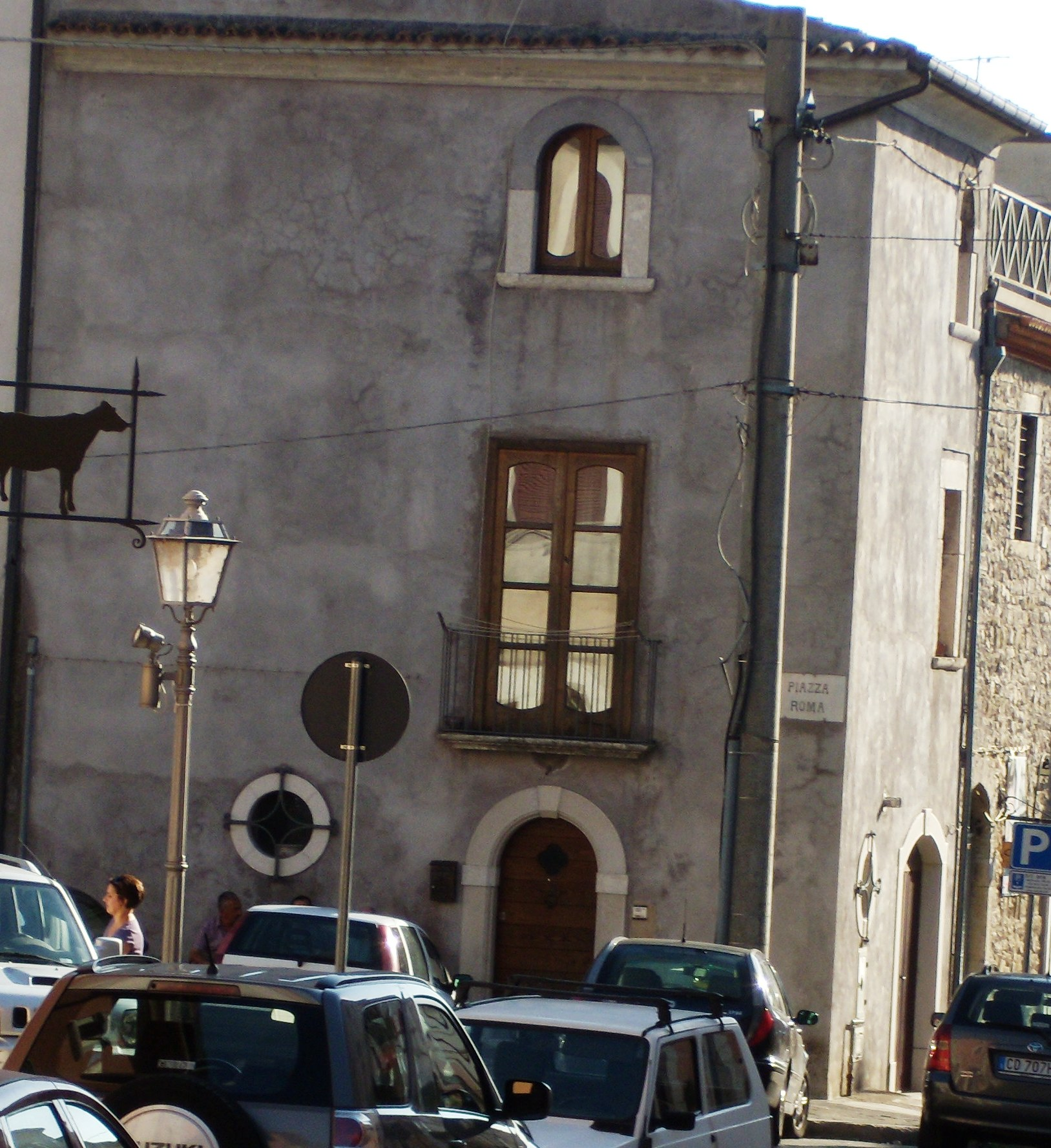 Casa del musicista Tommaso Carapella (1655-1736) nel centro storico di Cerreto Sannita.